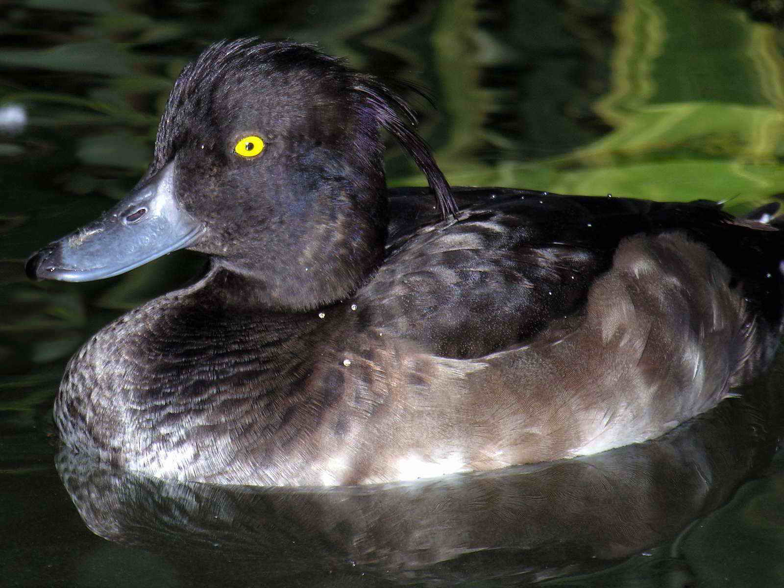 Foto tirada cunha Nikon E8800